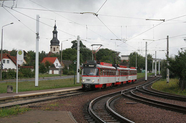 Endstelle Beesen